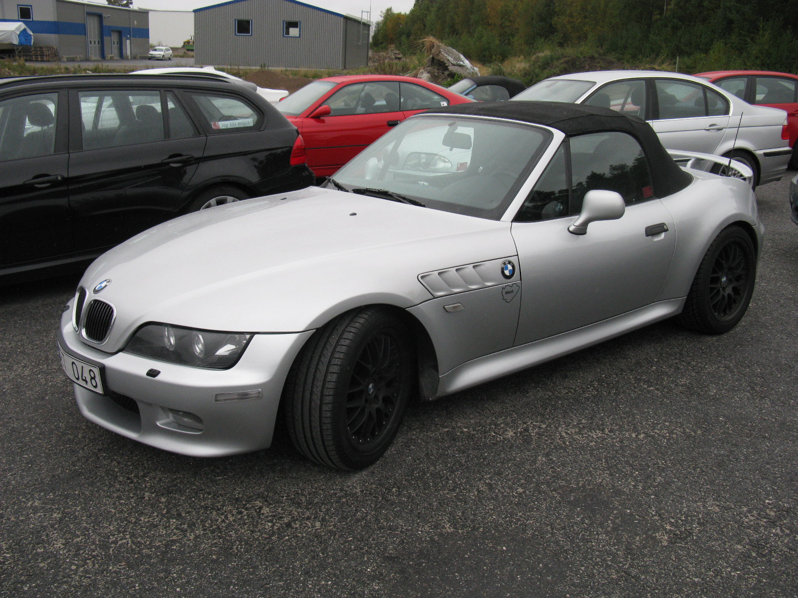 BMW Z3 Roadster